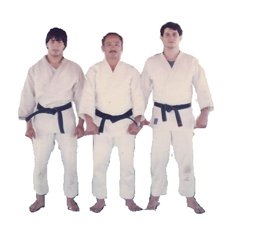 Yoshihiro Matsumura (centro) y sus discípulos Orlando Céspedes (izquierda) y Miguel Ángel «Michel» Salgado (derecha)